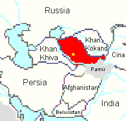 canato di buhara